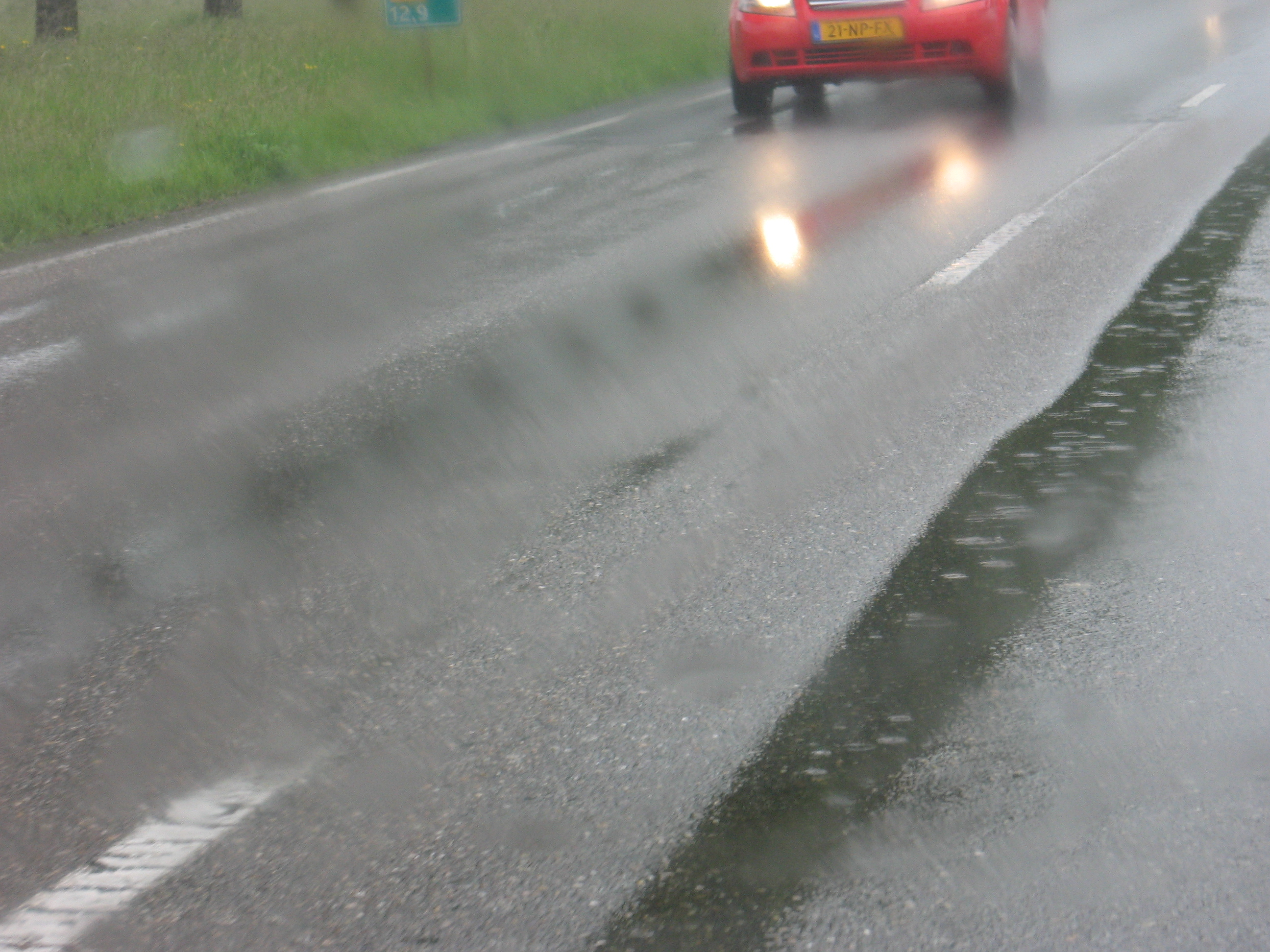 spoorvorming (N57)